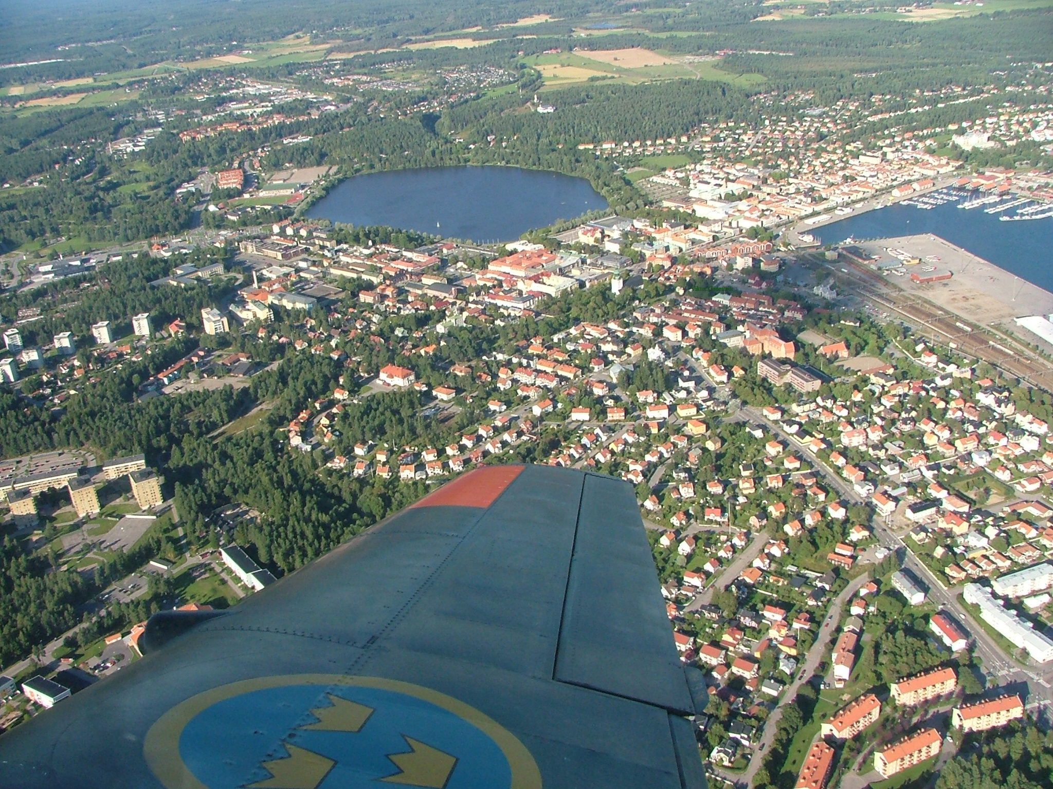 Hudiksvall